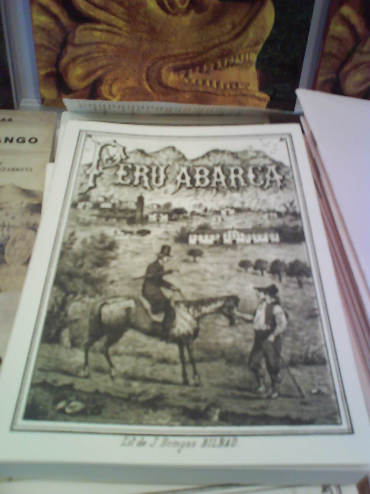 Portada del libro del escritor vasco Juan Antonio Moguel Peru Abarca.